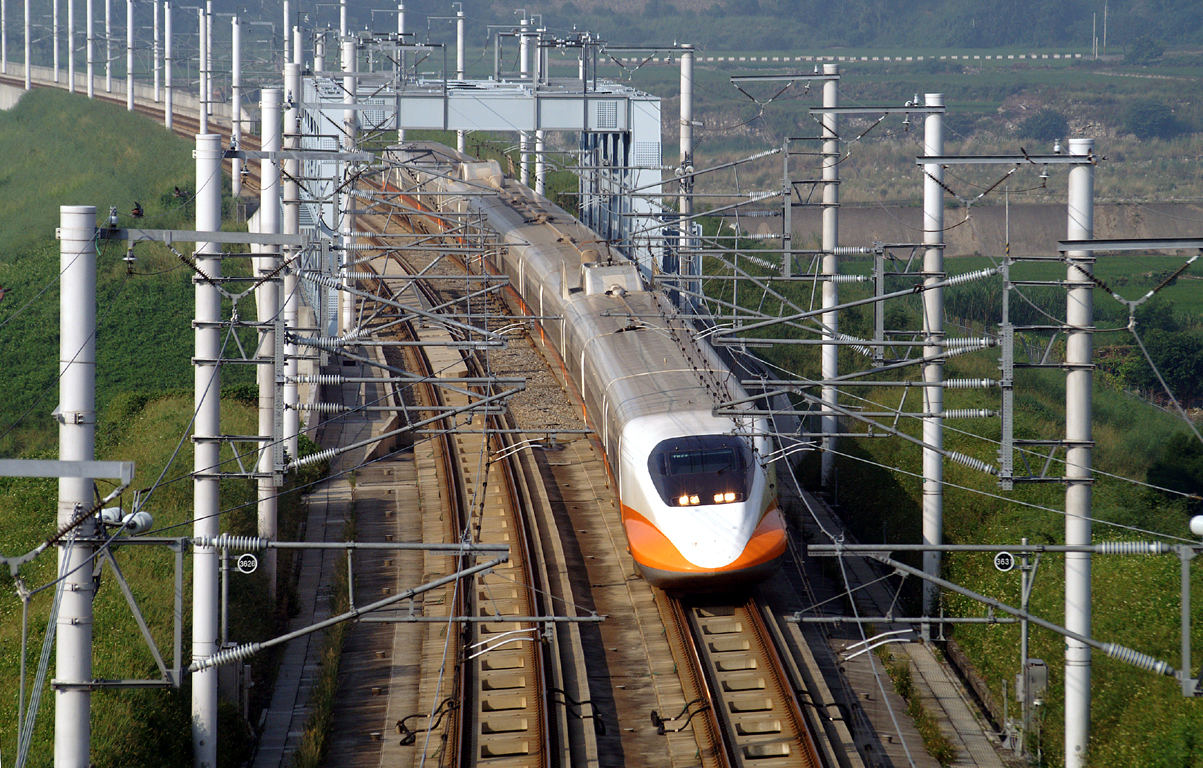 中文（台灣）: 台灣高鐵神岡隧道北口。